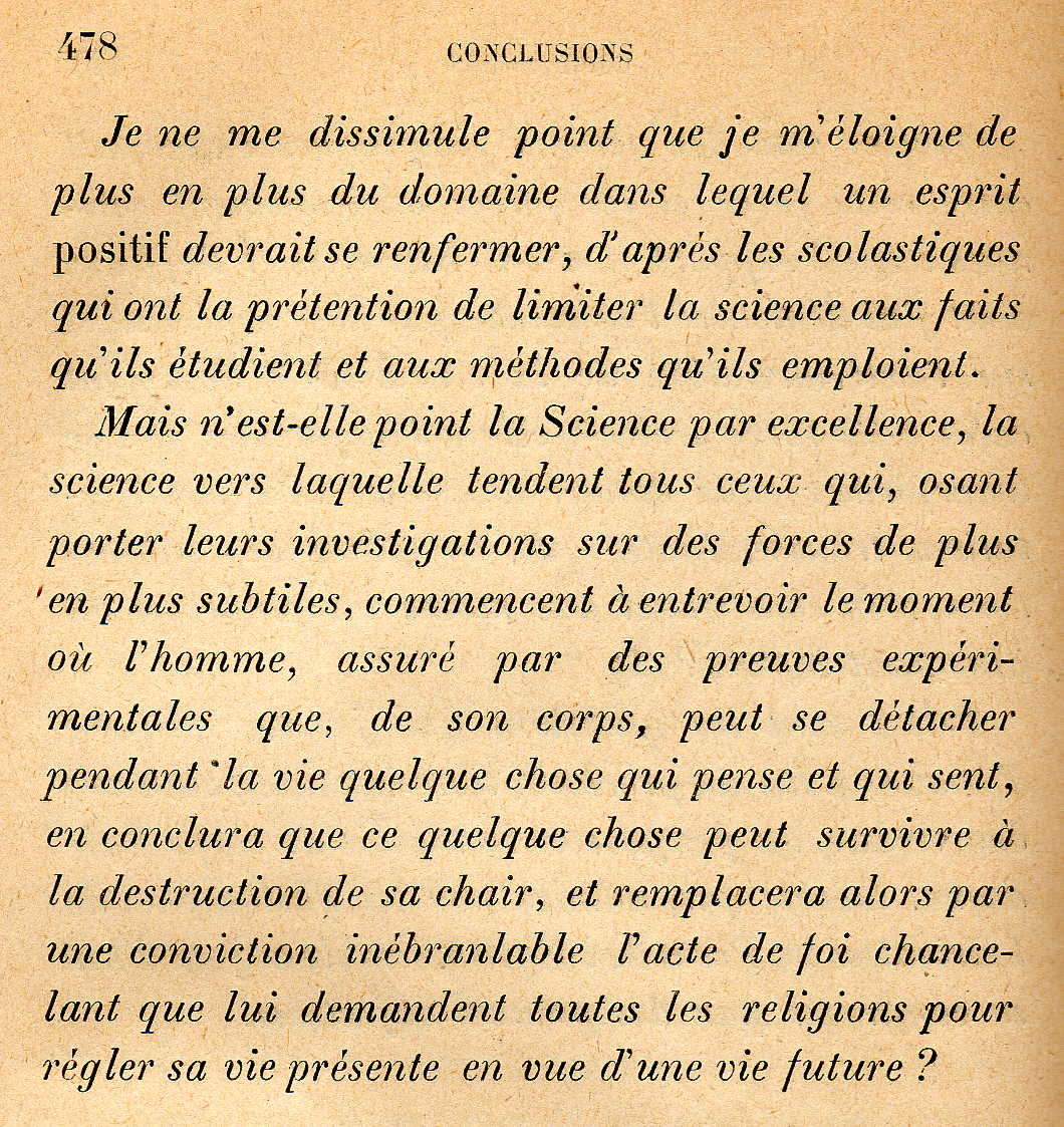 Dernière page de la conclusion du livre : L'extériorisation de la motricité d'Albert de Rochas.